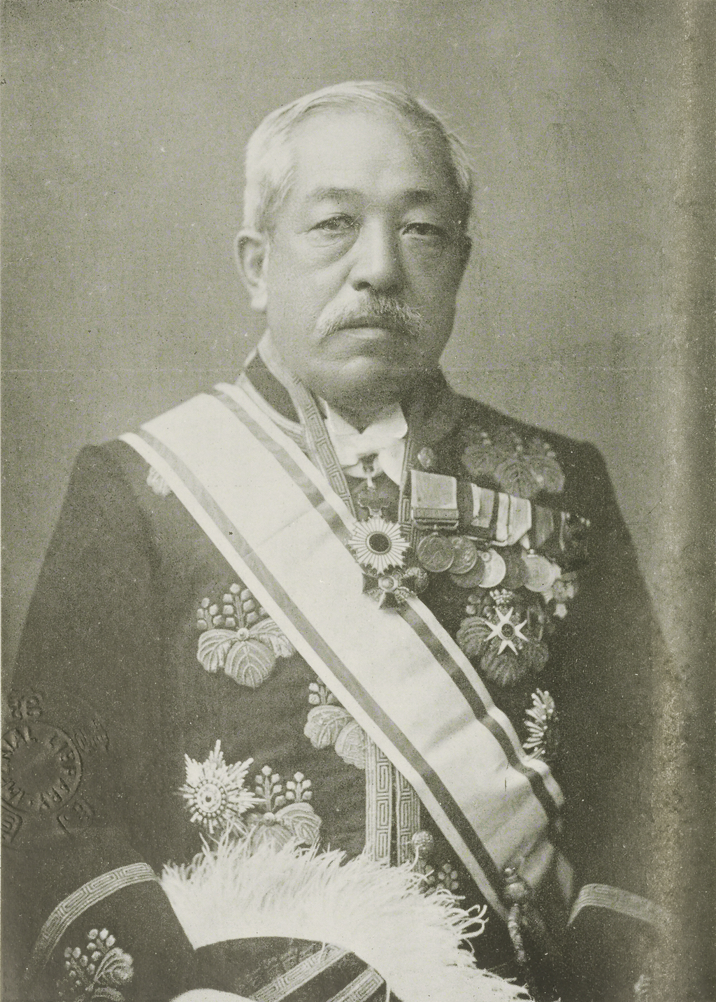 Portrait of Akiyama Masanosuke (秋山雅之介, 1866 – 1937)